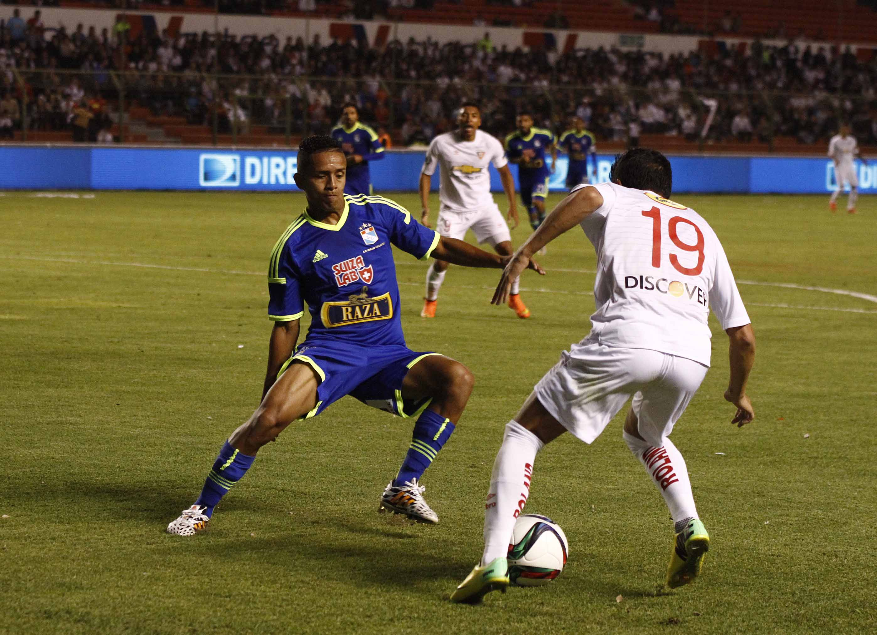 LIGA 1 MAV